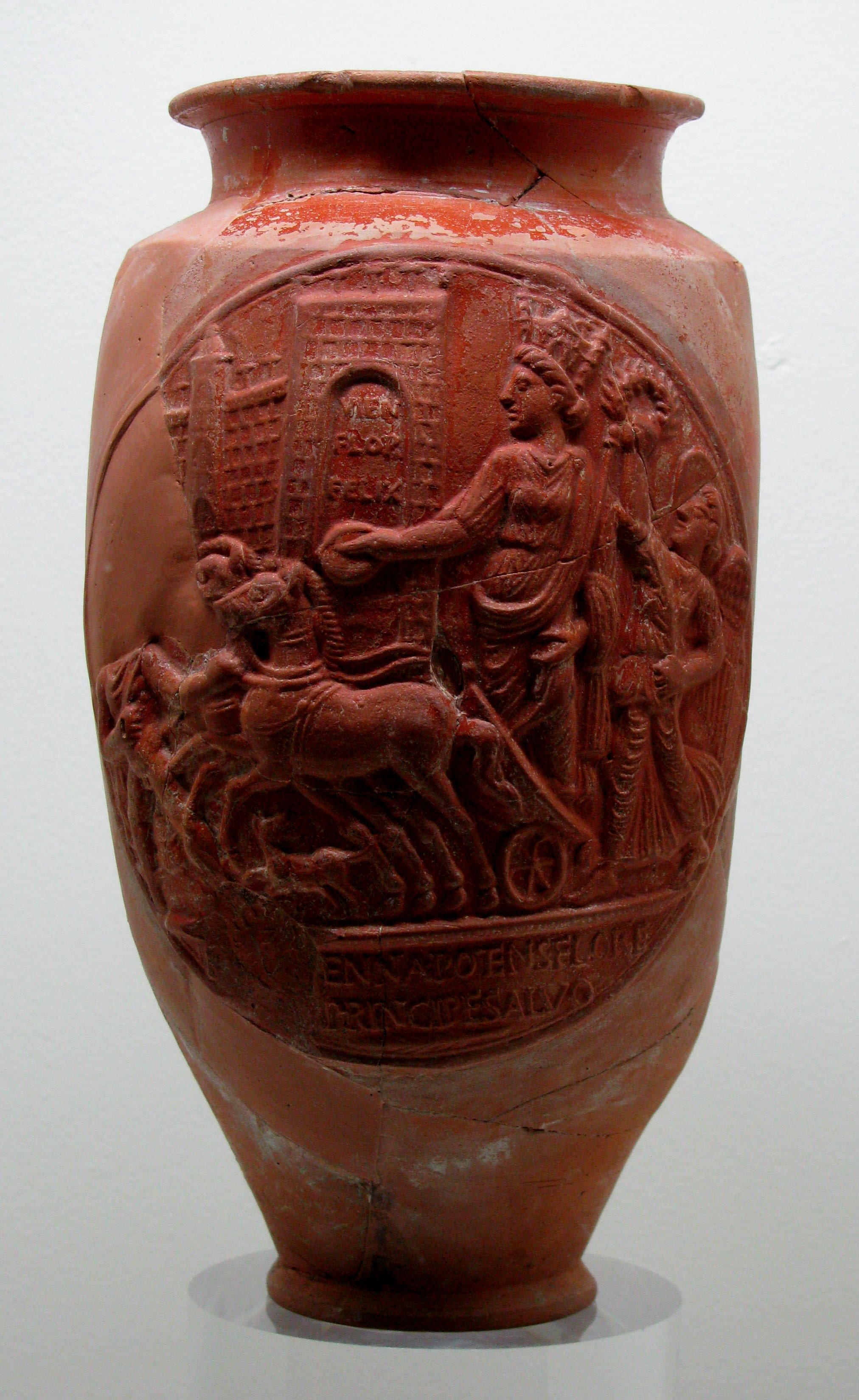 Vase à médaillon d'applique du IIe siècle ap. J.-C. trouvé en 1980 au Clos du Verbe Incarné (Lyon) et représentant le triomphe de Vienne personnifiée. Vienne sur un char porte sur la tête une couronne figurant l'enceinte de Vienne et est suivie d'une Victoire tenant une couronne de laurier. Inscription dans la porte : VIEN[na] FLOR[entia] FELIX. Inscription en bas : F[elix vi]ENNA POTENS FLOR[entia suo] PRINCIPE SALVO. Ref épigraphique : CAG-69-02, p 537 = CAG-69-02, p 547 = ZPE-198-306 = AE 1983, 00692